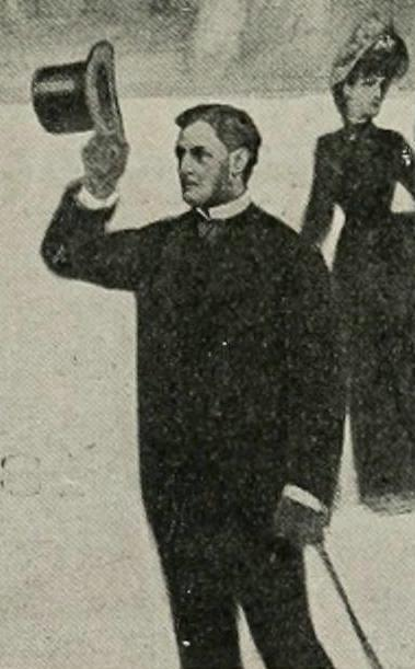 Baron de Soubeyran. Détail d'une série de photographies du panorama le "Tout-Paris" peint par Charles Castellani et présenté lors de l'exposition universelle de 1889.